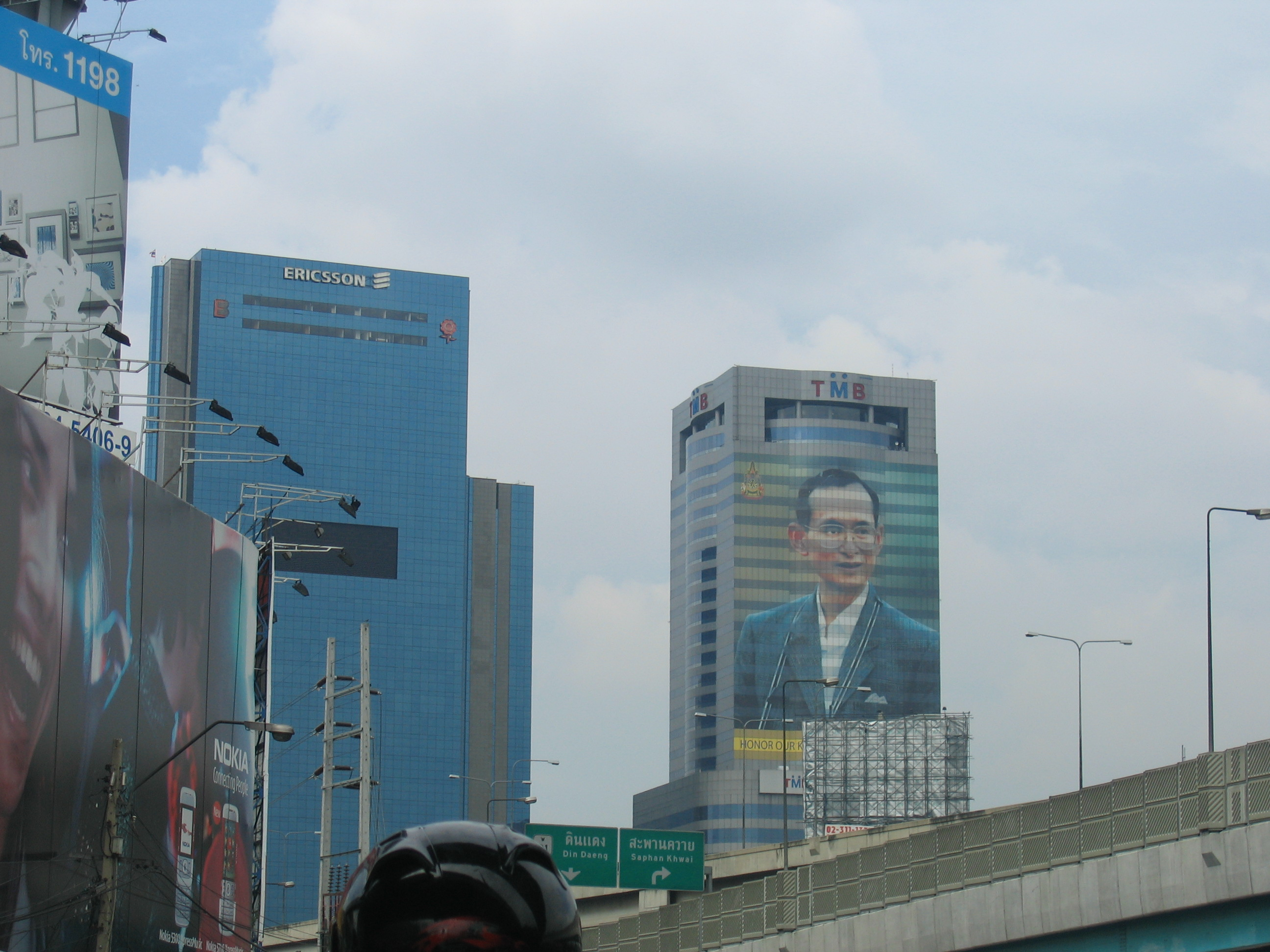 Sun Towers, Bangkok